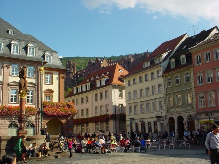 Heidelberg Market place Description in de wikipedia Heidelberg: Marktplatz, Blick auf das Rathaus, Im Hintergrund oberhalb das Heidelberger Schloss